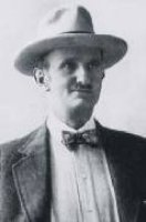 Antonín Drašar (1880 - 1939), Český herec a režisér.